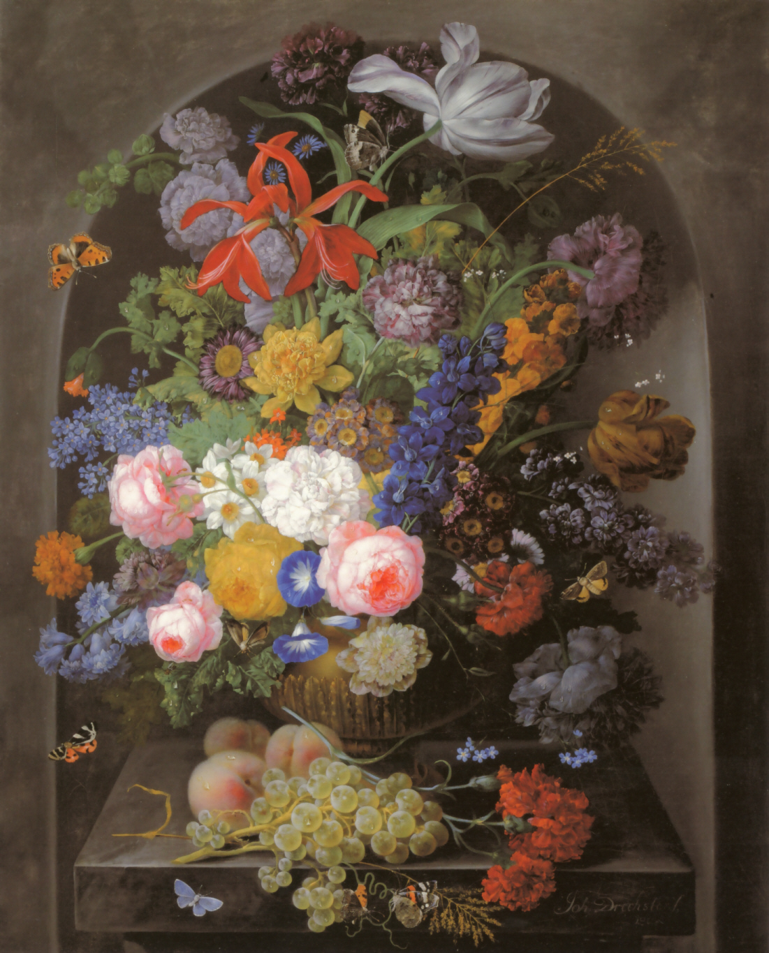 Blumenstilleben